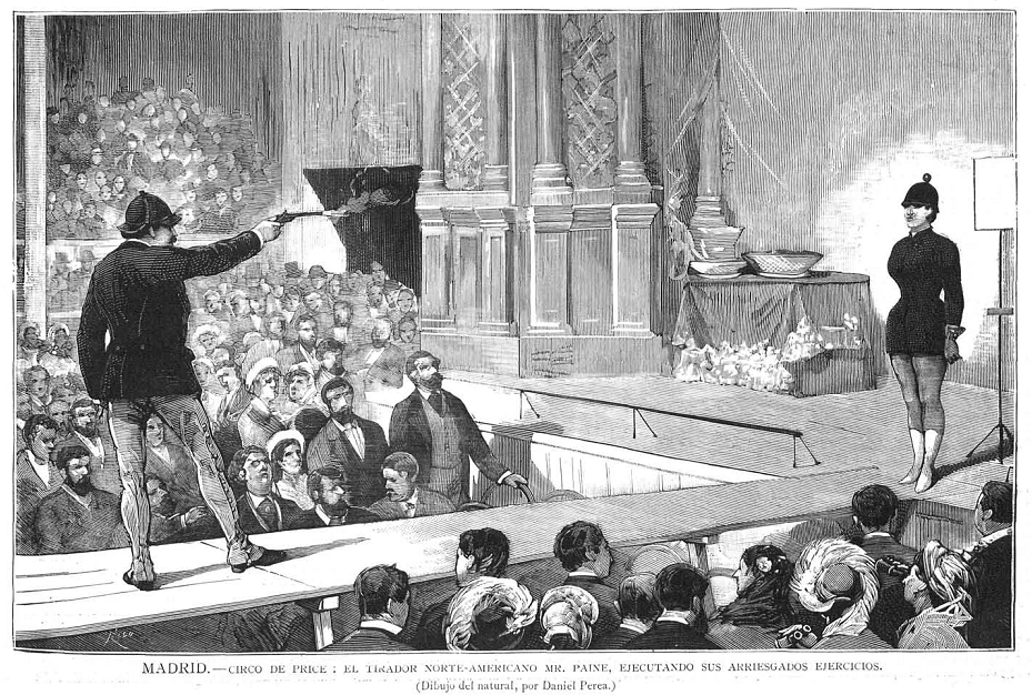 Madrid.— Circo de Price: el tirador norte-americano Mr. Paine, ejecutando sus arriesgados ejercicios. (Dibujo del natural, por Daniel Perea), en la revista española La Ilustración Española y Americana.